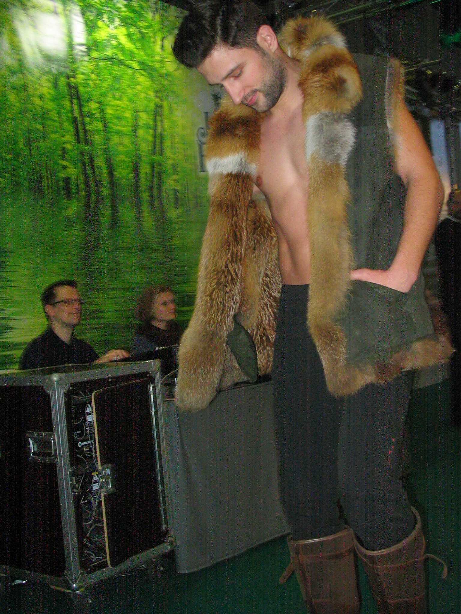 Rotfuchs-Herrenweste mit gefärbter Leder-Außenseite. Design und Ausführung: Oliver Ries, Bonndorf im Schwarzwald. „International German Red Fox Award“, ein Wettbewerb zur Förderung der Nutzung der anfallenden einheimischen Felle, insbesondere der Rotfuchsfelle. Teilnahmeberechtigt waren die Mitglieder des Zentralverbands des deutschen Kürschnerhandwerks und die Kürschner Österreichs, der Schweiz und der Niederlande. Sponsoring u. a. durch die Zeitschrift „Wild und Hund“, Messe „Jagd und Hund“. Anlässlich und auf der Messe „Jagd und Hund“, Dortmund Westfalenhallen, 29. Januar bis 3. Februar 2013.